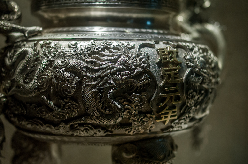 Bảo tàng lịch sử